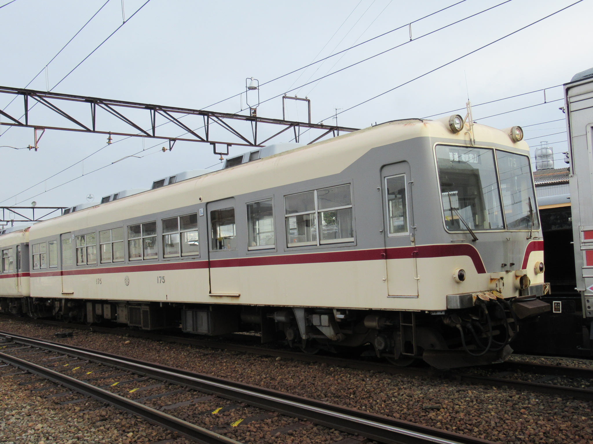 富山地方鉄道 クハ175